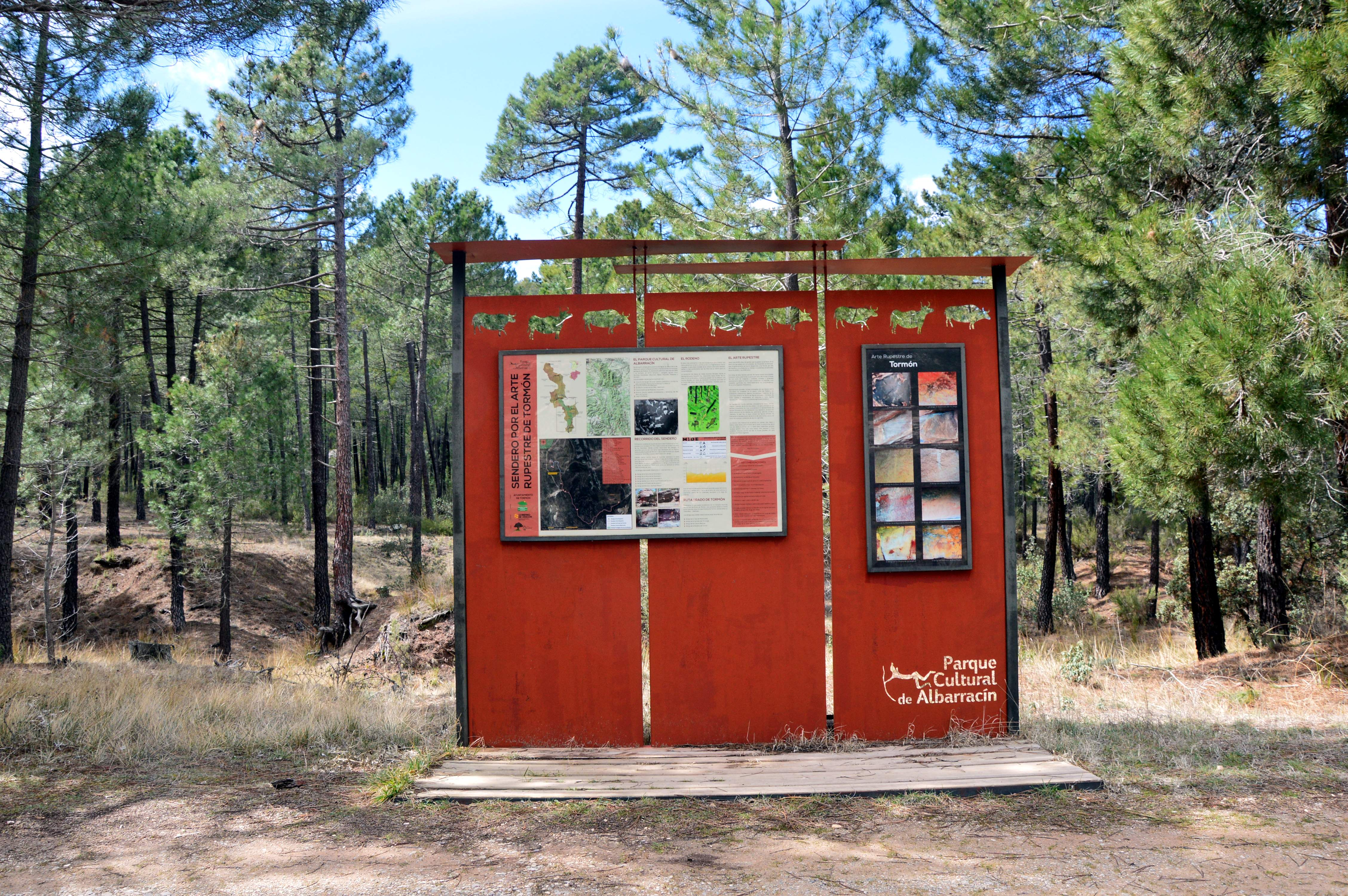 Panel de contenidos relativo a la pinturas rupestres de Tormón -Parque Cultural de Albarracín-: junto al camino de acceso a la Casa Forestal (2018).